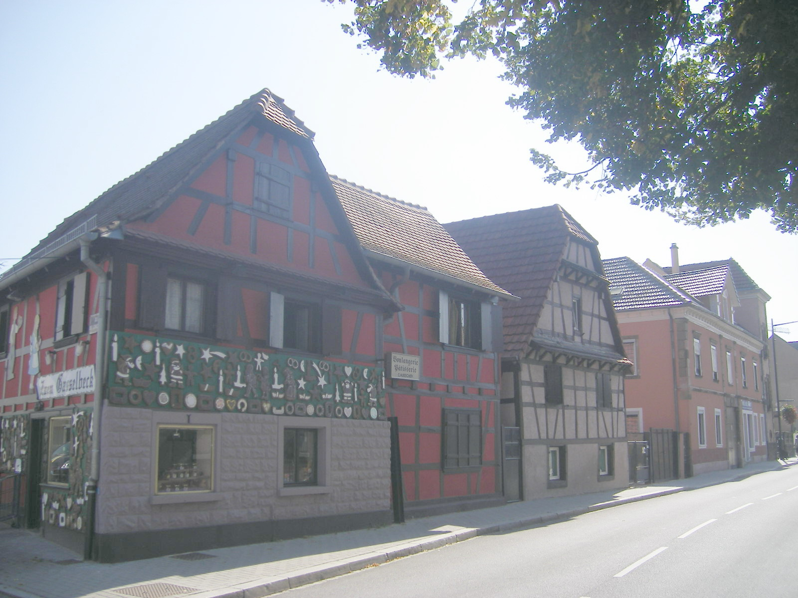 Hoenheim